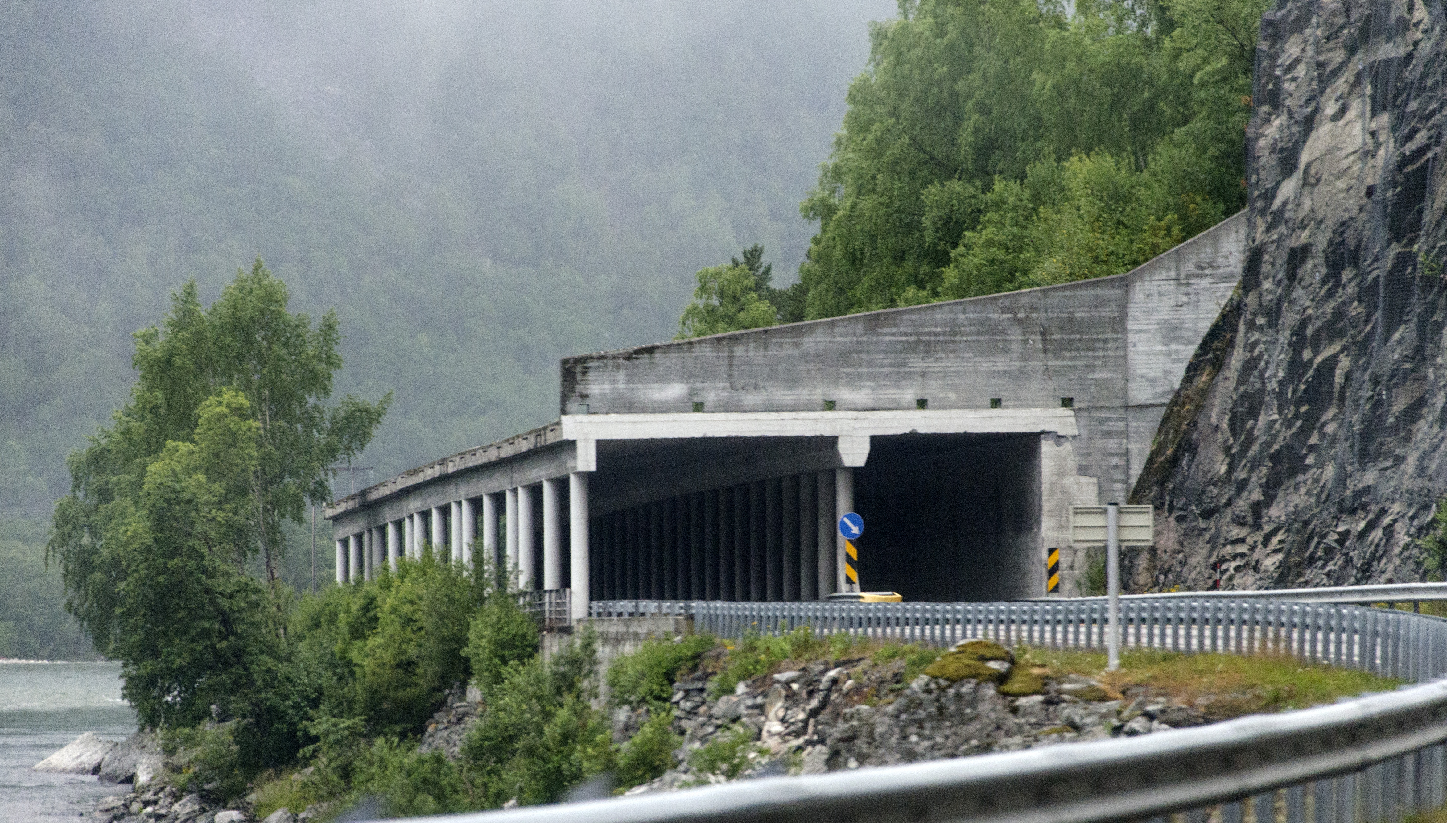 Klinghammaroverbygget, riksvei 70, Sunndal